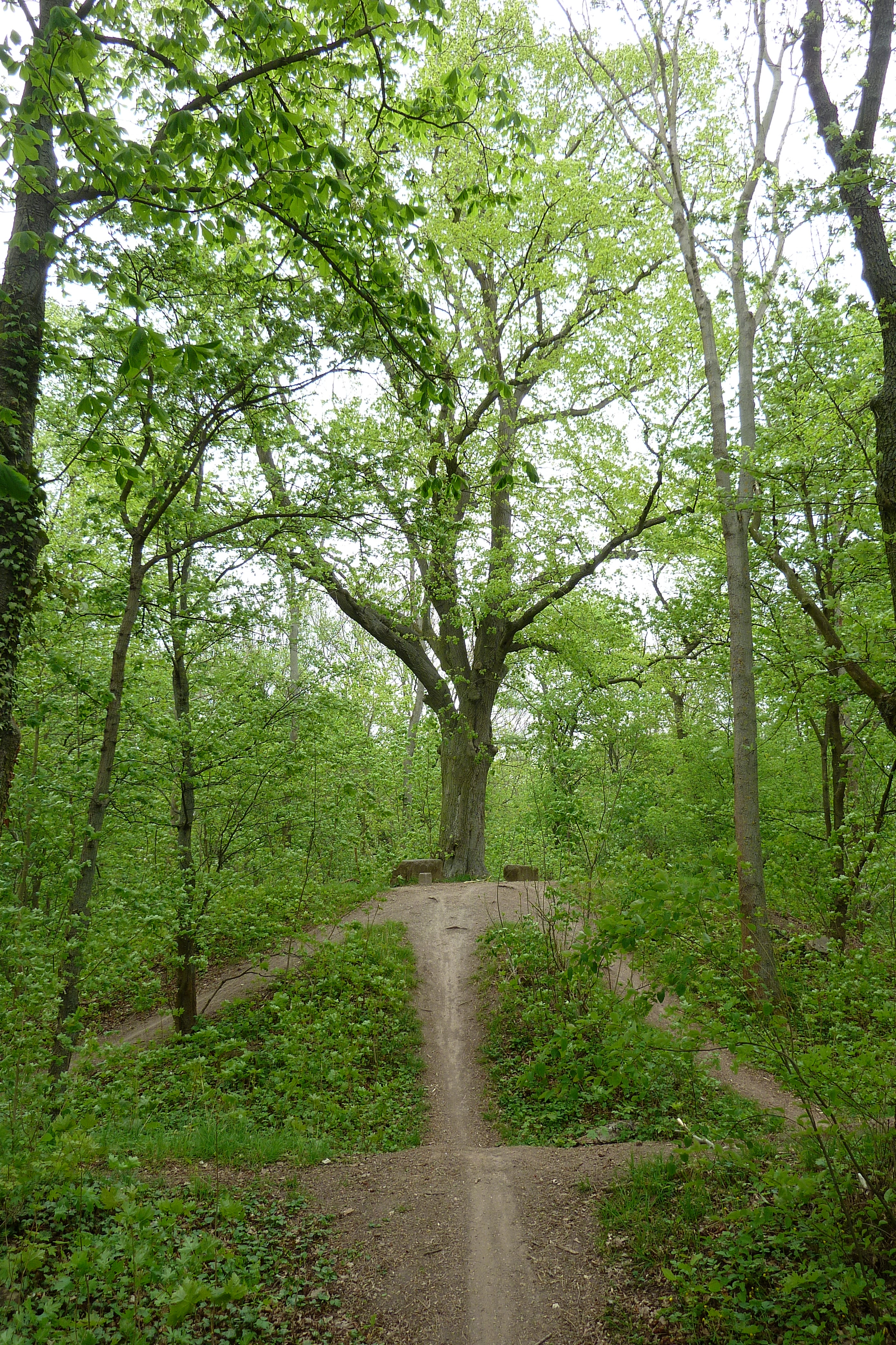 Zingel und Hügel der Rosdorfer Warte bei Rosdorf, Landkreis Göttingen, Südniedersachsen